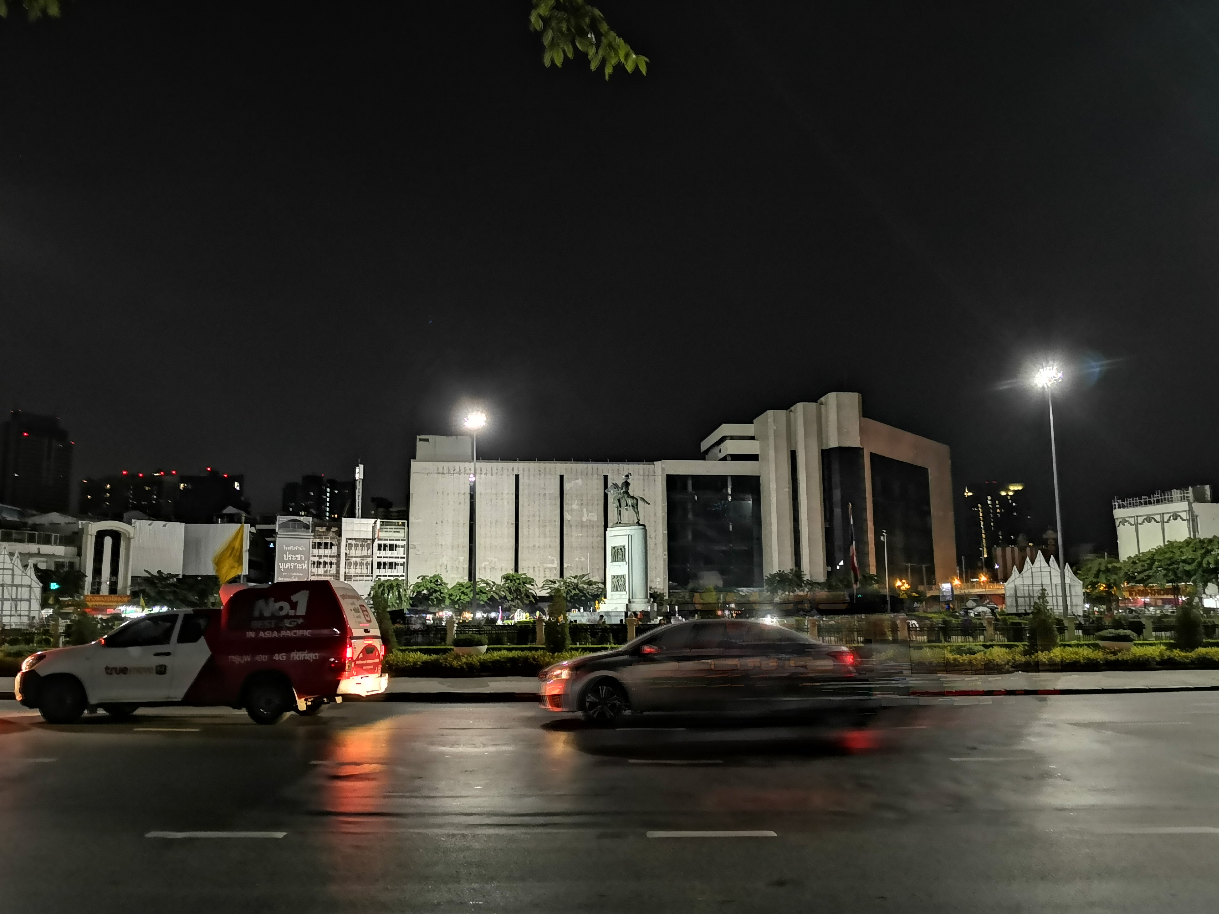 พระบรมราชานุสาวรีย์สมเด็จพระเจ้ากรุงธนบุรีและวงเวียนใหญ่